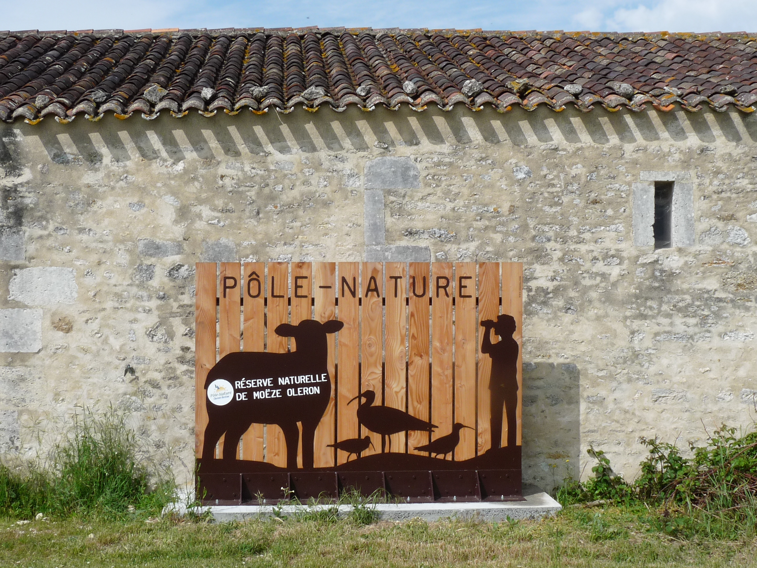 Réserve naturelle nationale de Moëze-Oléron (Charente-Maritime) : Ferme de Plaisance